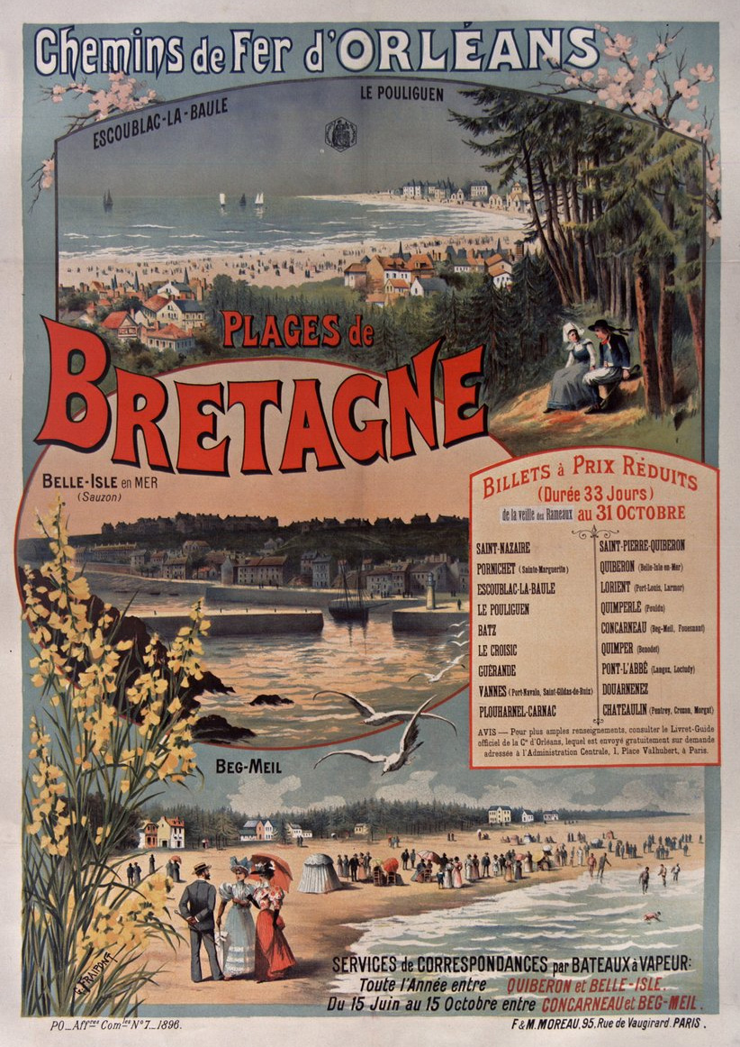 Affiche publicitaire de la Compagnie des chemins de fer de Paris à Orléans pour les plages de la Bretagne